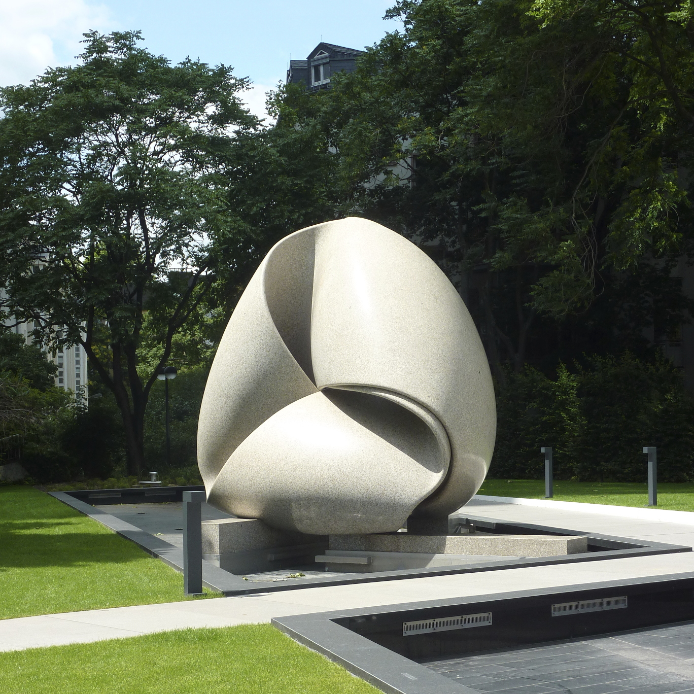 Kontinuität (auch „Koloss von Frankfurt“) ist eine 1986 vollendete Skulptur des schweizer Bildhauers Max Bill (1908–1994). Das Kunstwerk, das mit 80 Tonnen Gewicht zu den schwersten Granitskulpturen der Welt zählt, steht in der deutschen Stadt Frankfurt am Main an den Hochhaus-Zwillingstürmen der Deutschen Bank. In den Jahren 2007 und 2011 wurde die Skulptur jeweils um einige Meter von ihrem ursprünglichen Standort im Vorhof der beiden Hochhäuser versetzt; Ihr gegenwärtiger Standort ist eine Grünanlage neben der Deutsche-Bank-Zentrale